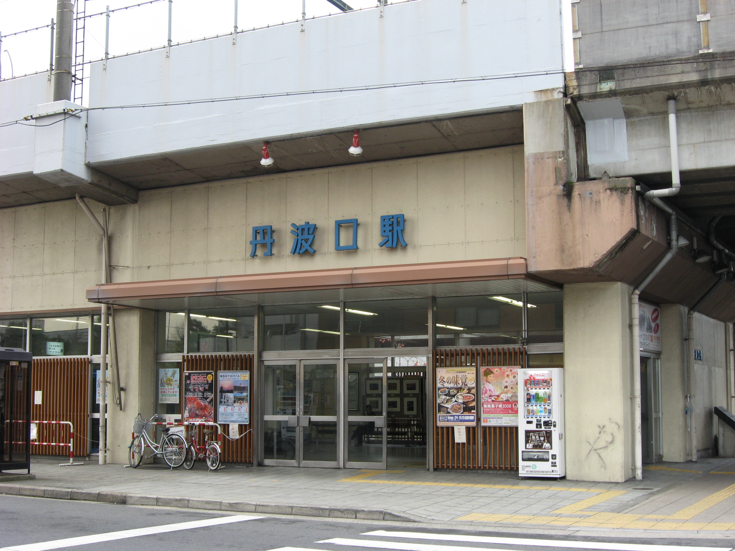 JR Tambaguchi Station